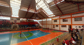 Coliseo Universitario de Sucre